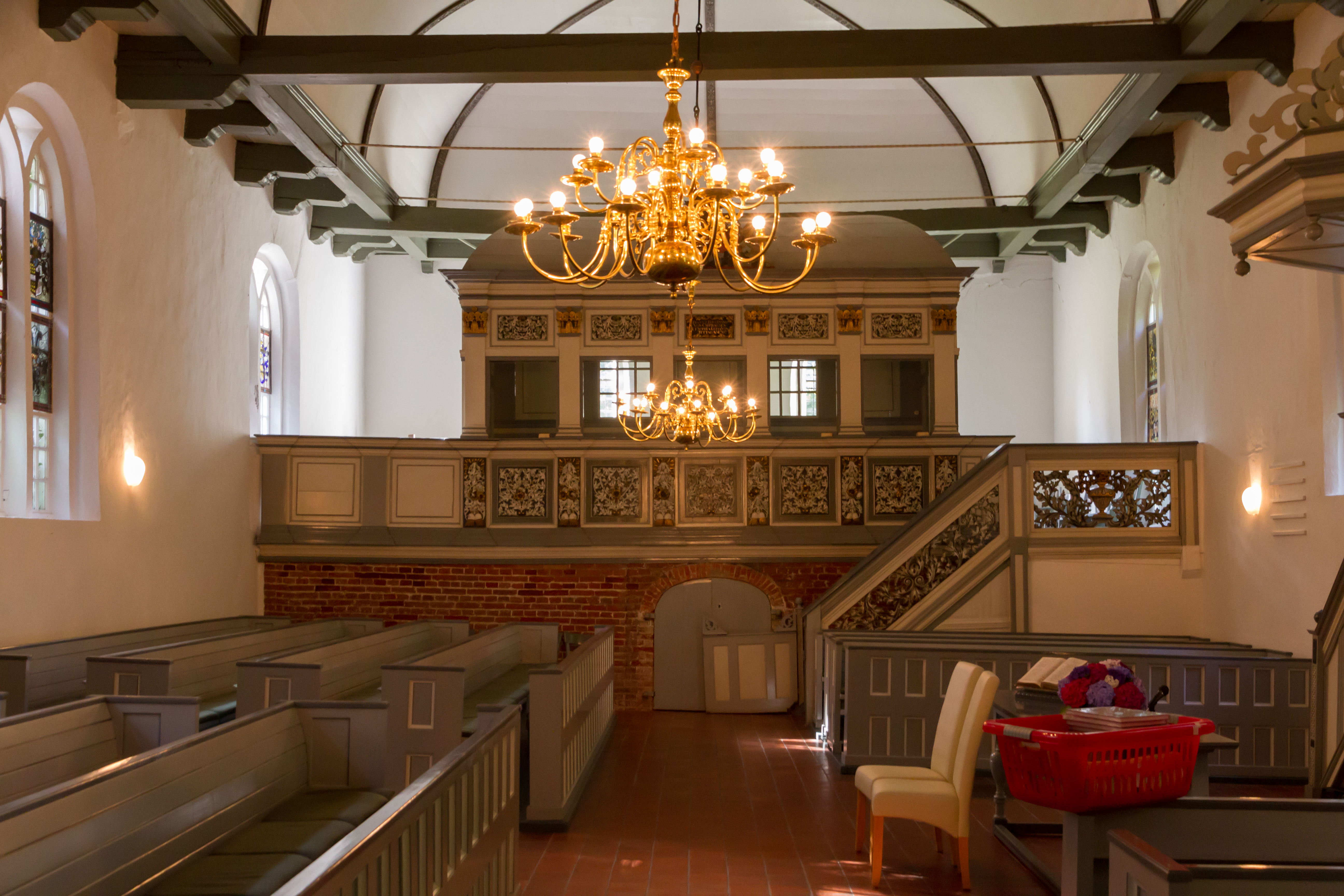 Bargeburer Church - interior